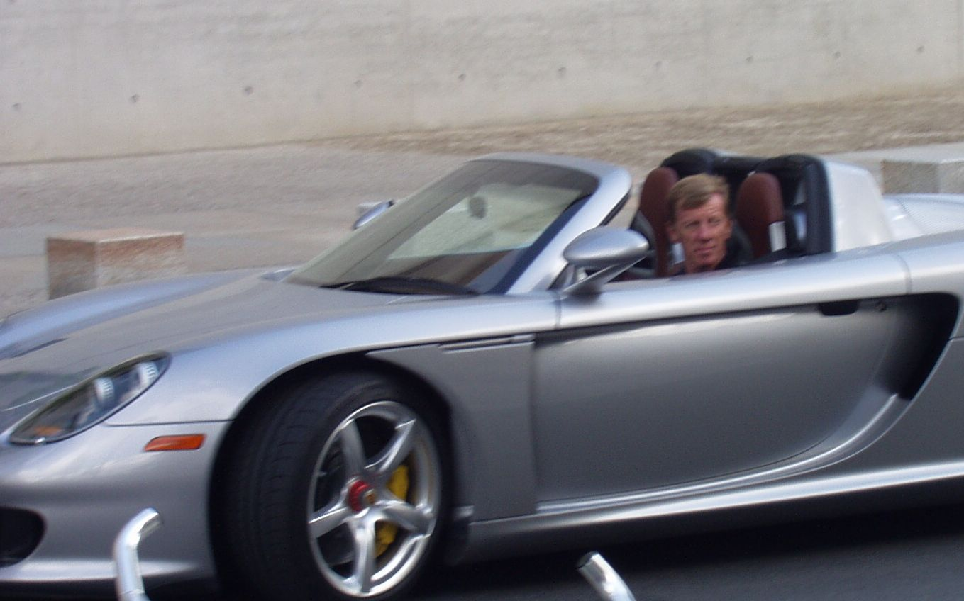 Walter Röhrl bei Werbeaufnahmen mit Porsche Ort: Berlin - Reichstagsgebäude